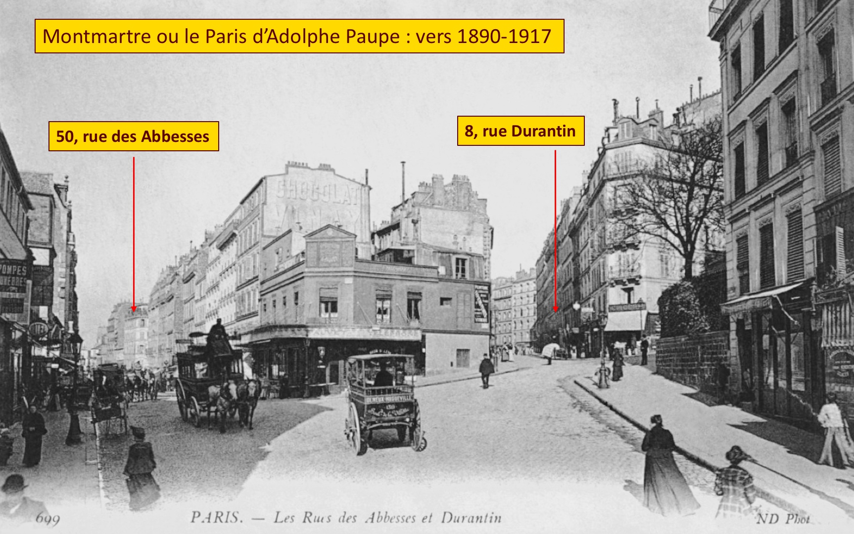 Localisation des domiciles d'Adolphe Paupe à Montmartre : rue Durantin et rue des Abbesses, vers 1890-1917 ; sur une carte postale ancienne.